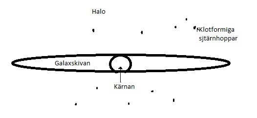 Galaktisk halo är området i en galax utanför galaxskivan där stjärnhoppar och olika objekt roterar runt galaxens centrum. De objekten som man har hittat i den galaktiska halon är klotformiga stjärnhoppar.